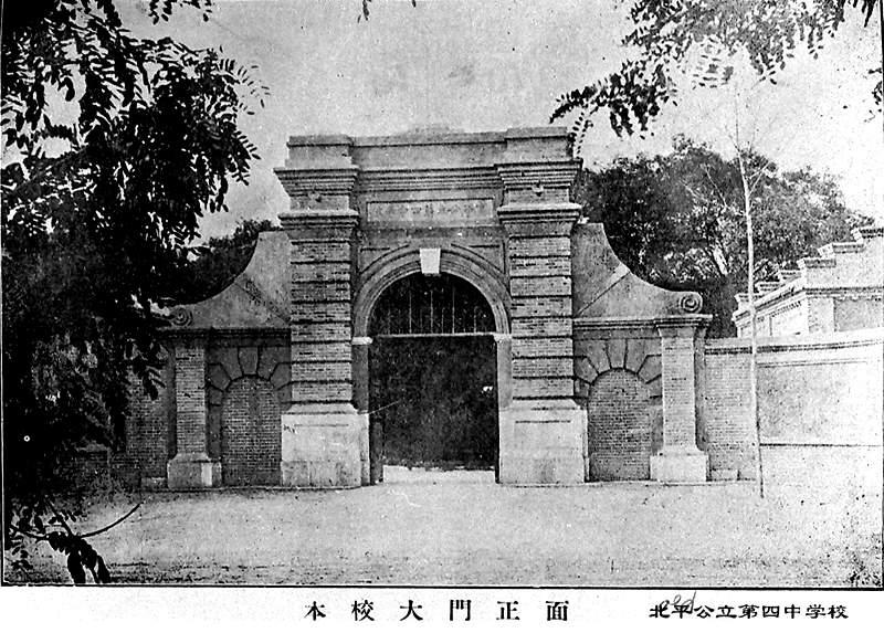 民国十年建成的北平公立第四中学校校门正面。